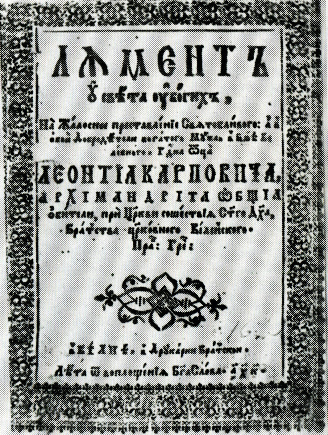 Тытульны аркуш «Ляманта на смерць Л. Карповіча»